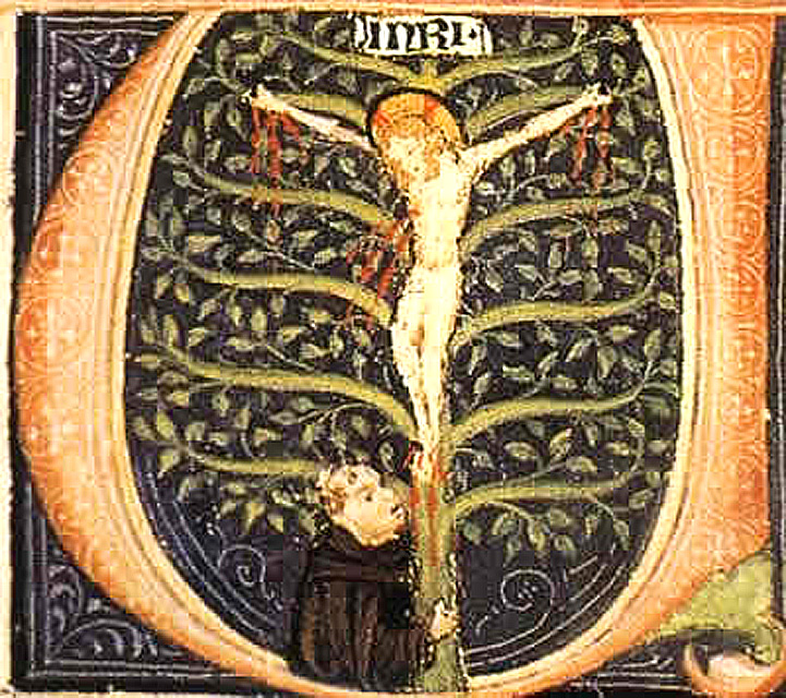 Ubertin de Casale, auteur de Arbor vitae crucifixae Jesu Christi, miniature de 1485